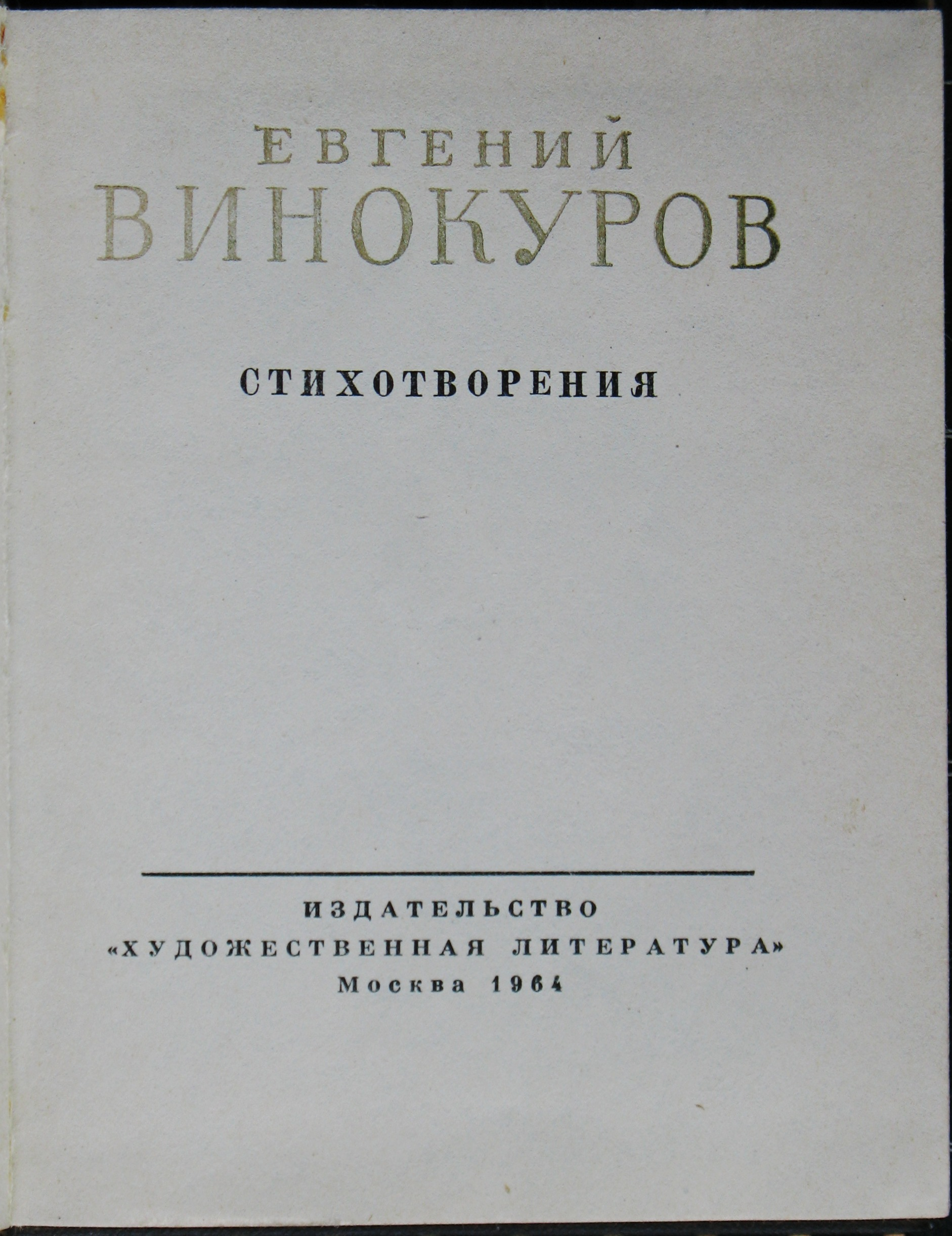 Soviet poet Evgeny Vinokurov book.